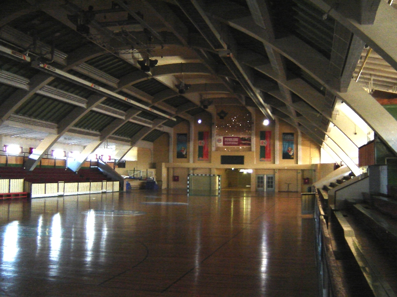 Hermann-Gieseler-Halle (Innenraum) Magdeburg